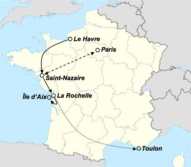 Villes visitées lors du film Tournée (2010) de Mathieu Amalric